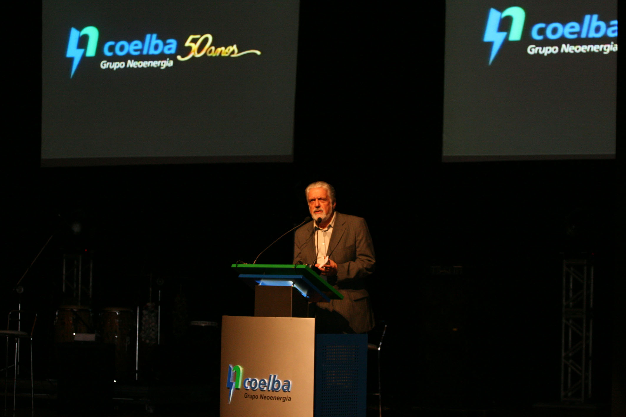 Governador Jaques Wagner participa dos 50 anos da Coelba do Grupo Neoenergia Na foto: Foto: Roberto Viana/AGECOM